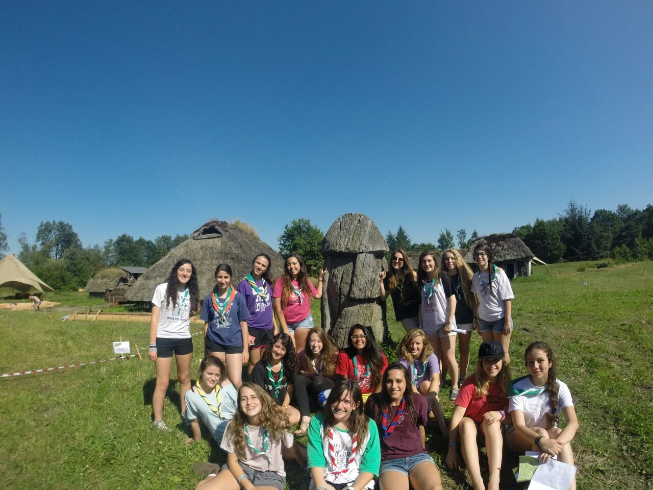 משלחת תנועת הצופים לדנמרק 2014